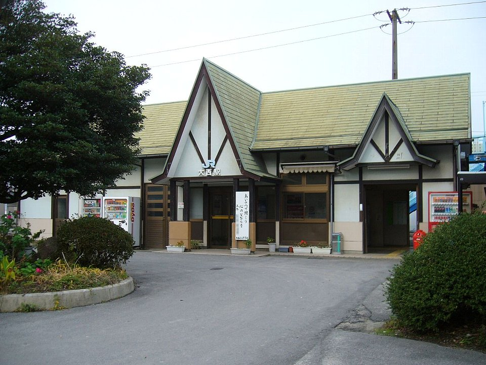 予讃線大西駅 2006年12月16日 Bakkai撮影